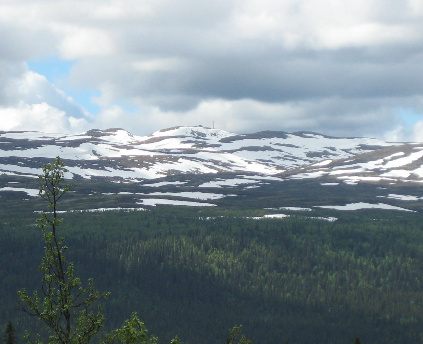 Spåtind sett fra Oppsjøhøgda